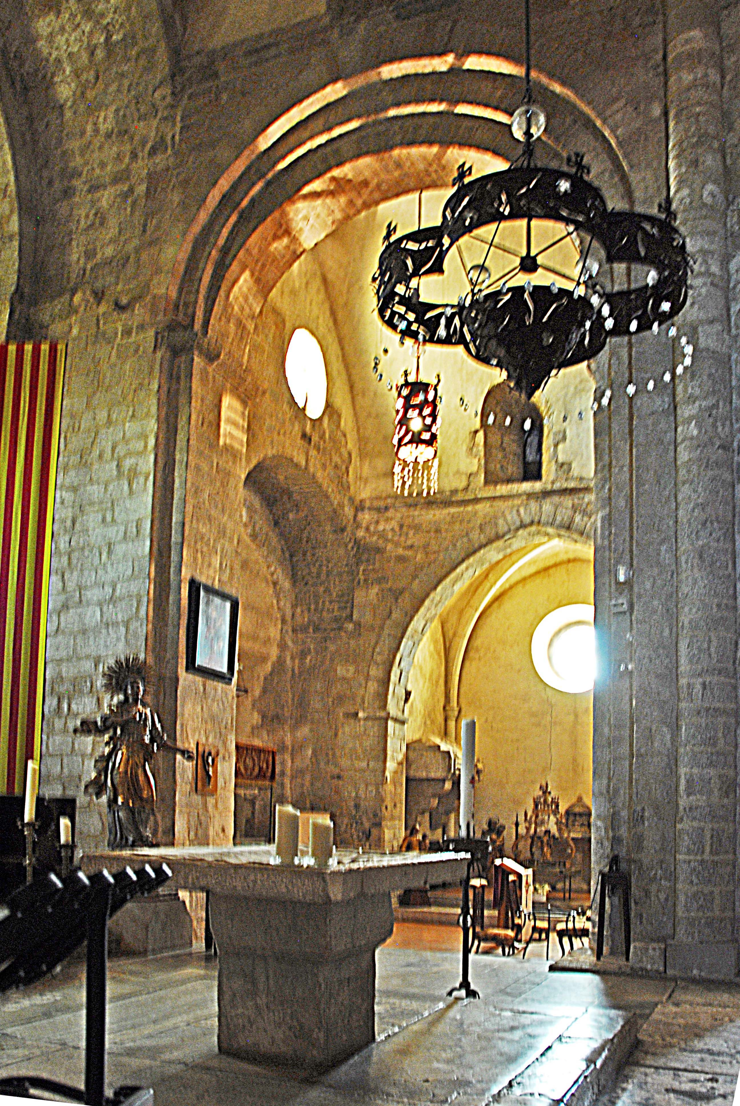 Ste-Eulalie-et-Ste-Julie_d’Elne, Joch 6 aus nördl. Seitenschiff